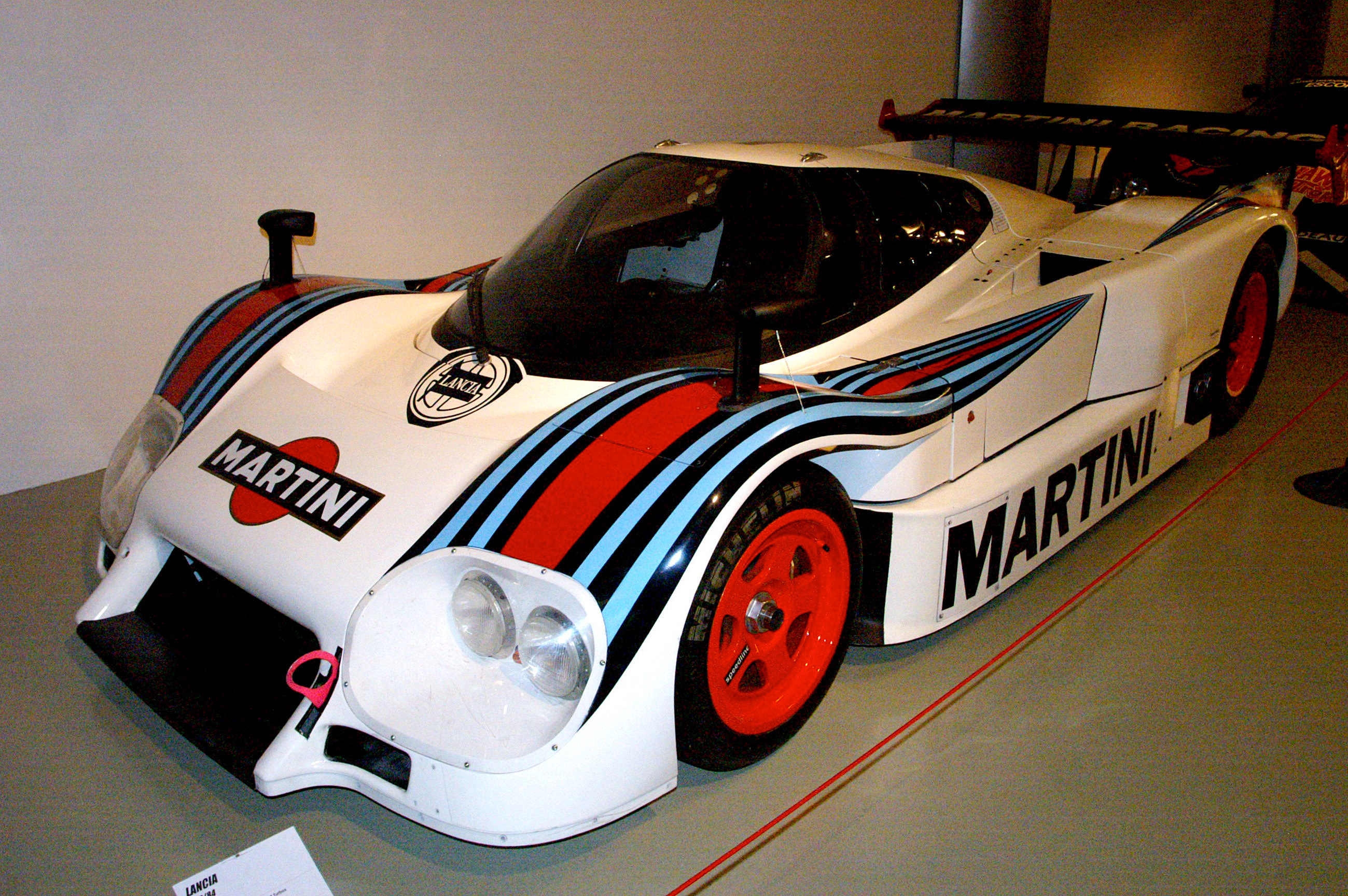 Le Musee des 24 Heures. 8th Le Mans 1984